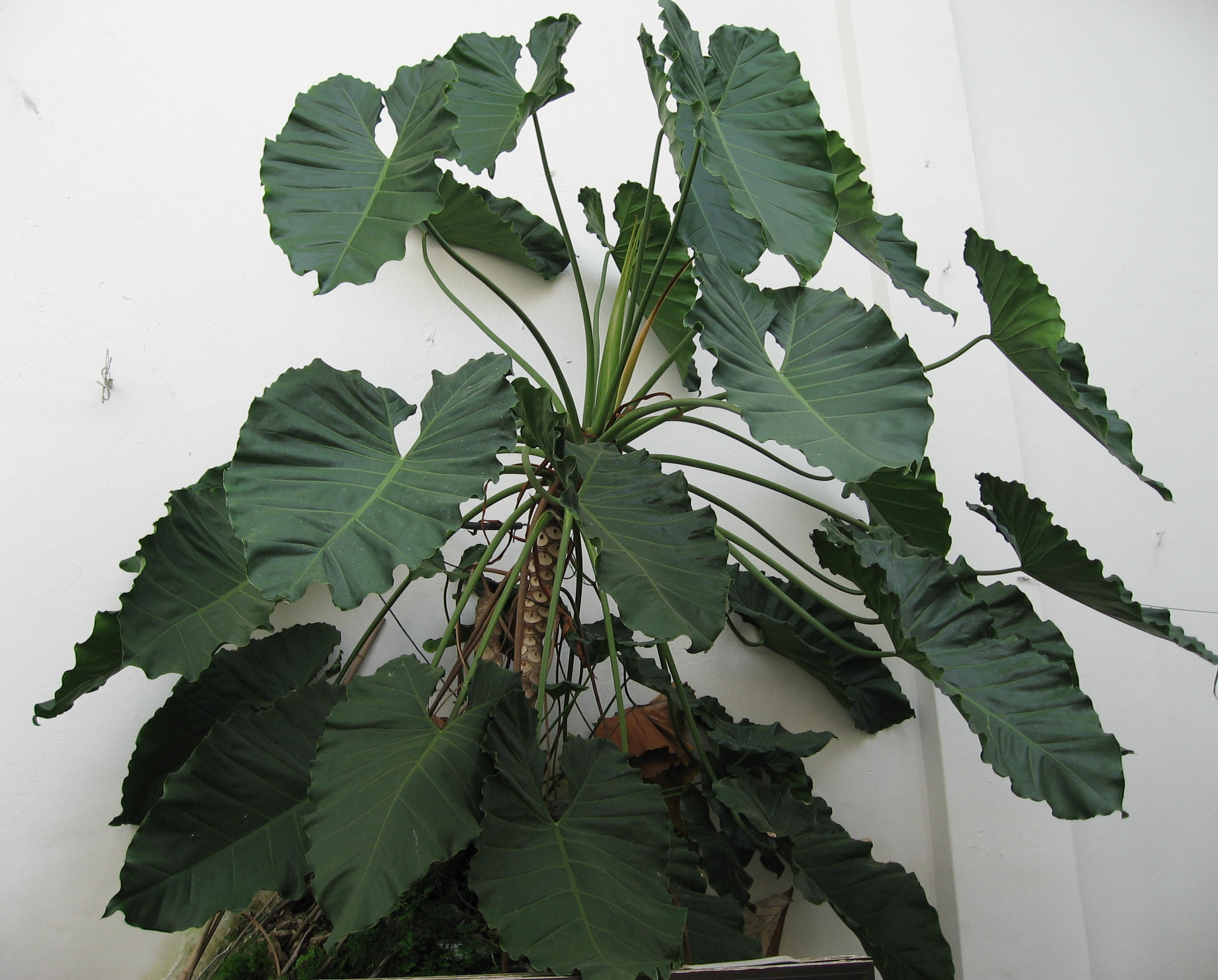 Philodendron speciosum in Giardino dei Semplici di Firenze Map: 43° 46' 45" N 11° 15' 39" E